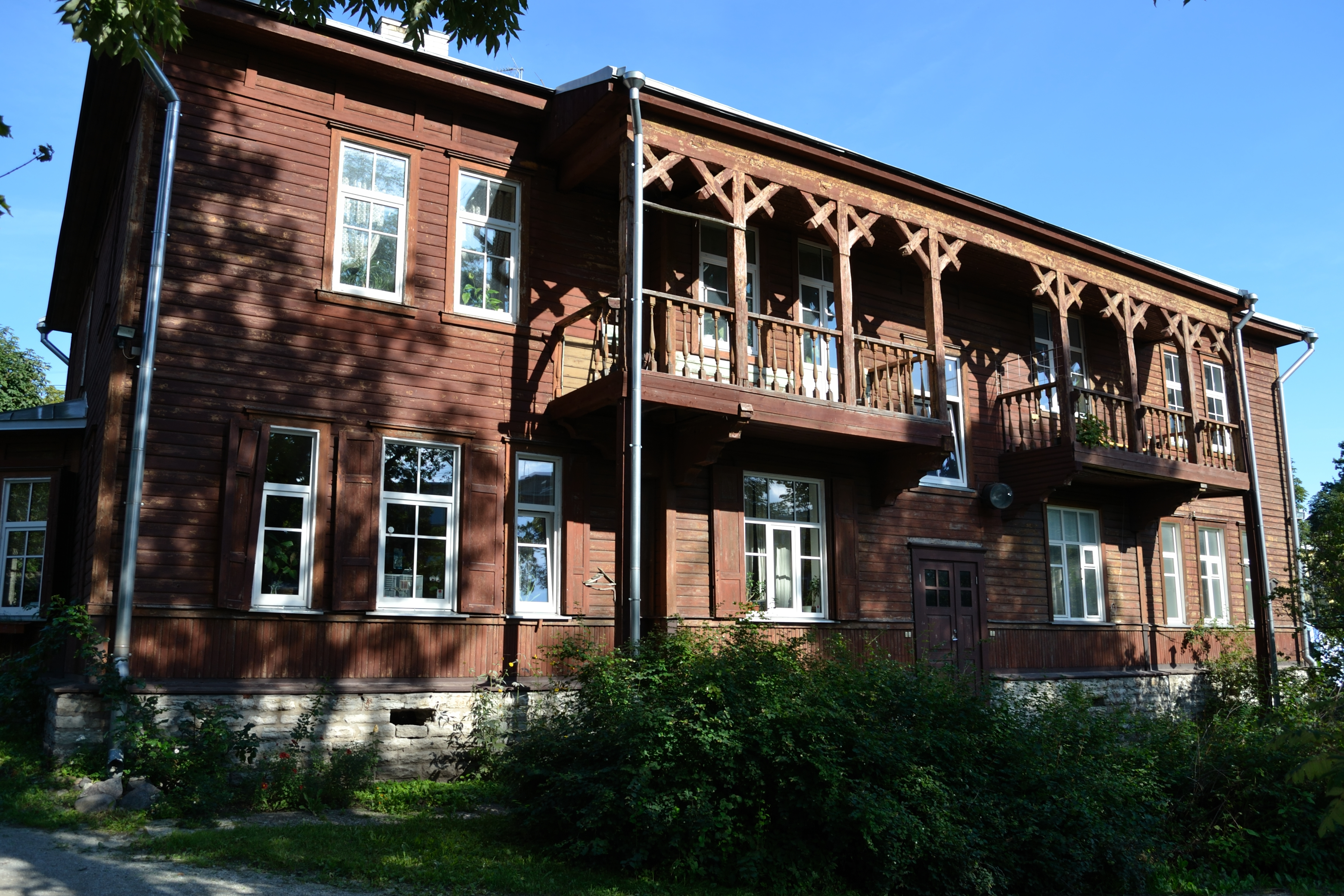 Tallinn, Vene-Balti laevatehase vanemteenistujate elamu Kaluri tn 7, 1914